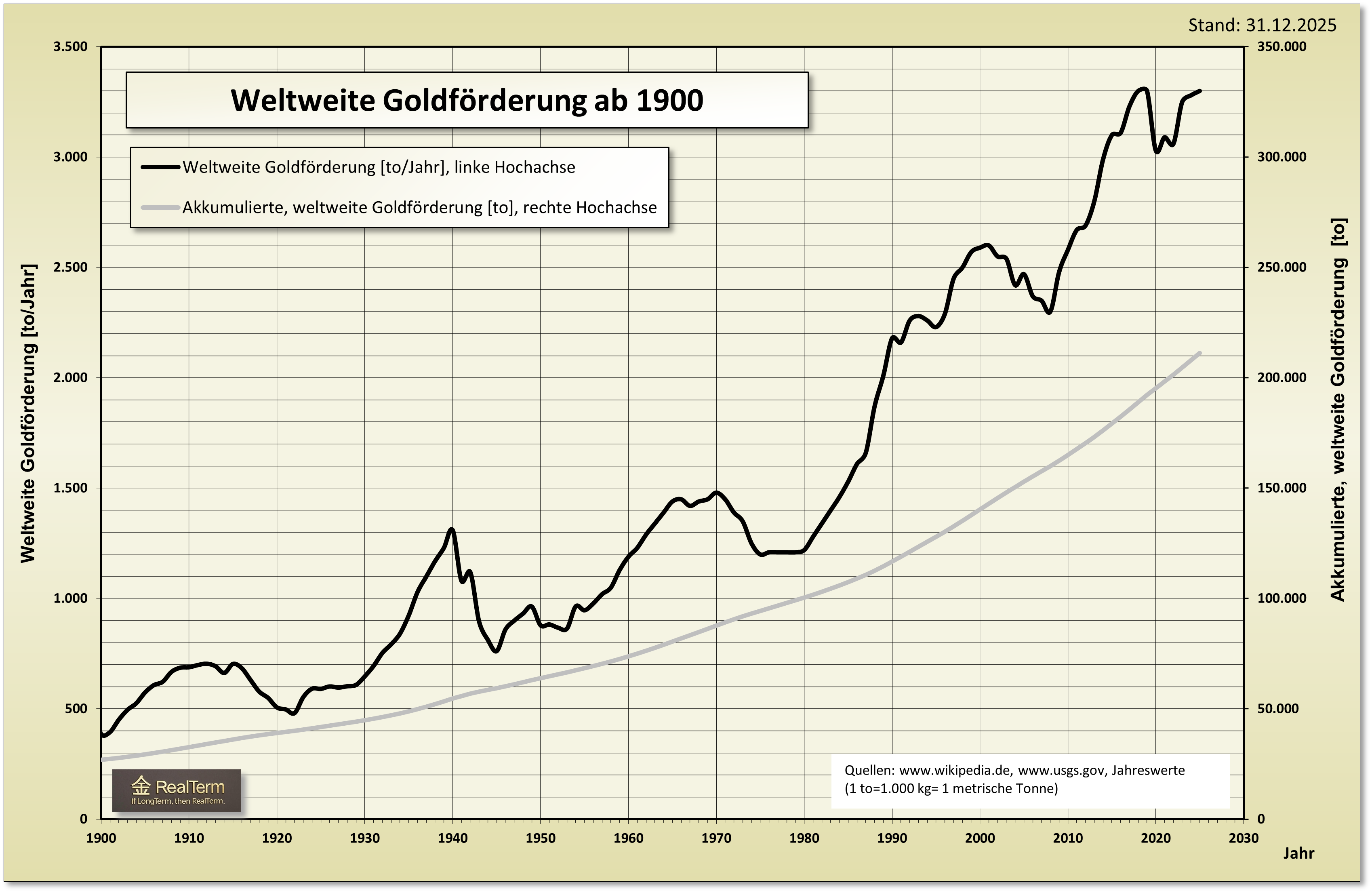 Jährliche Goldförderung und Weltgoldmenge ab 1900